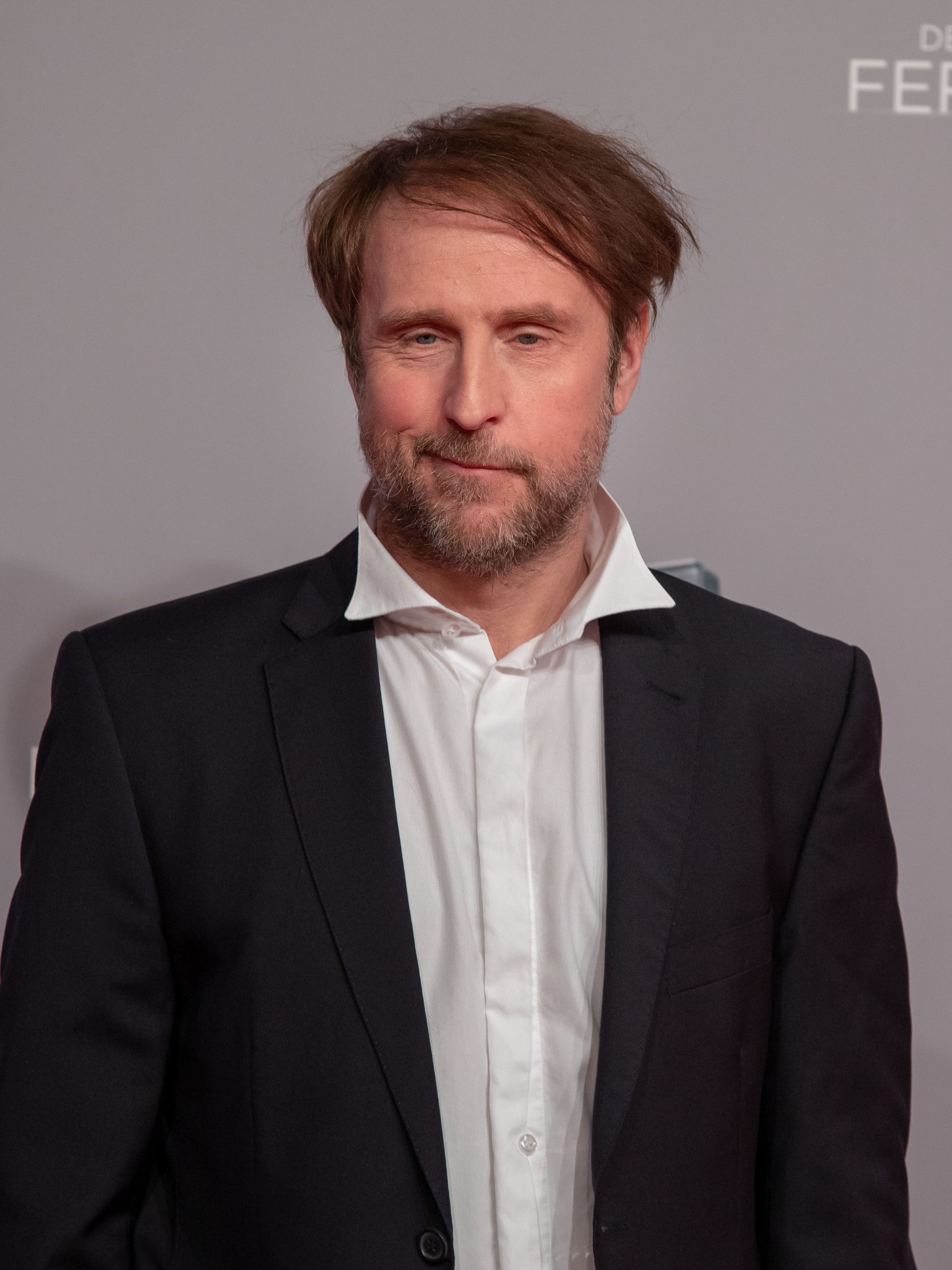 Bjarne Mädel beim Deutschen Fernsehpreis 2019 in der Düsseldorfer Rheinterrasse